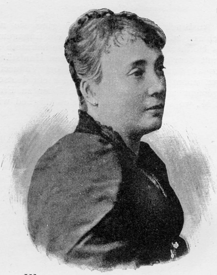 Klementine Schuch-Proska